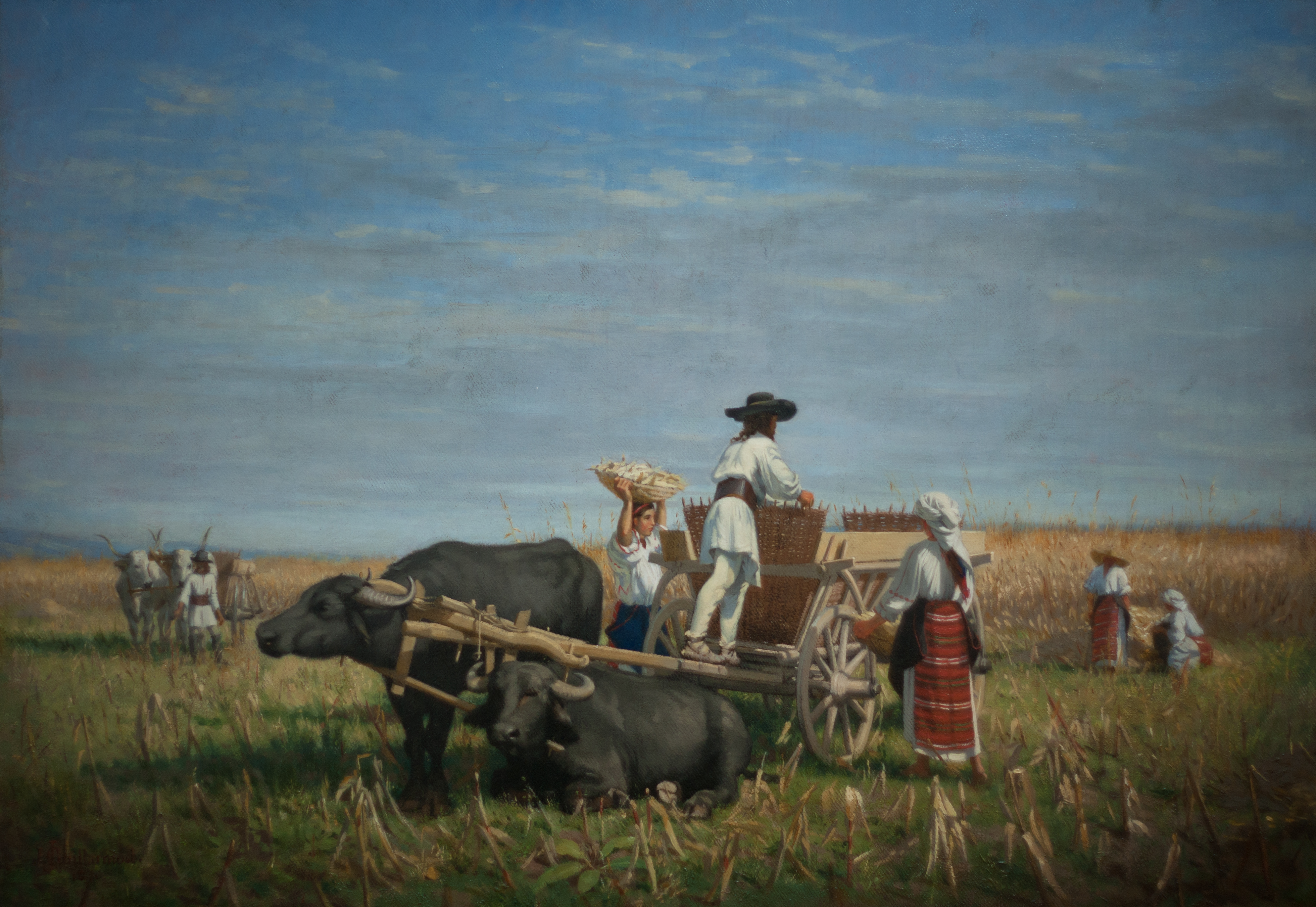 Récolte de maïs en Transylvanie. Huile sur toile de Jules Jacod Guillarmod